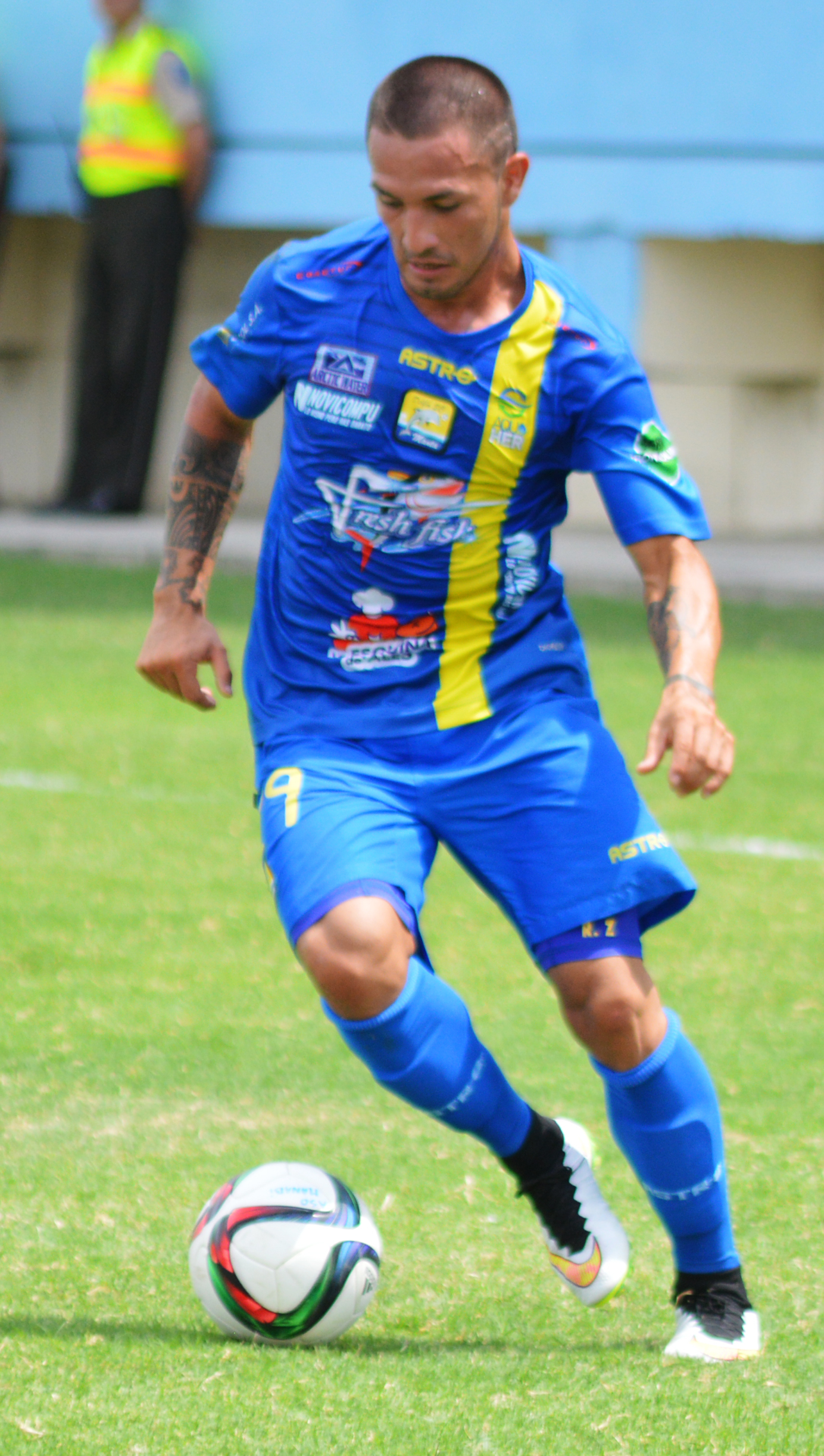 Rody Zambrano en Delfín Sporting Club de Manta-2015